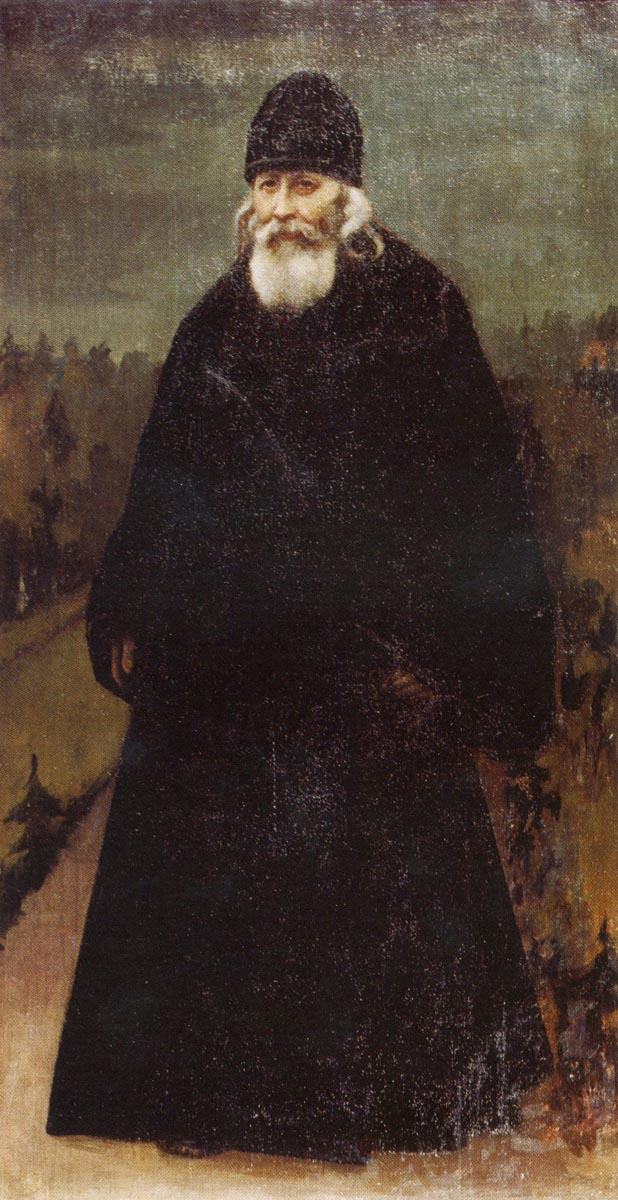 Святой Варнава Гефсиманский